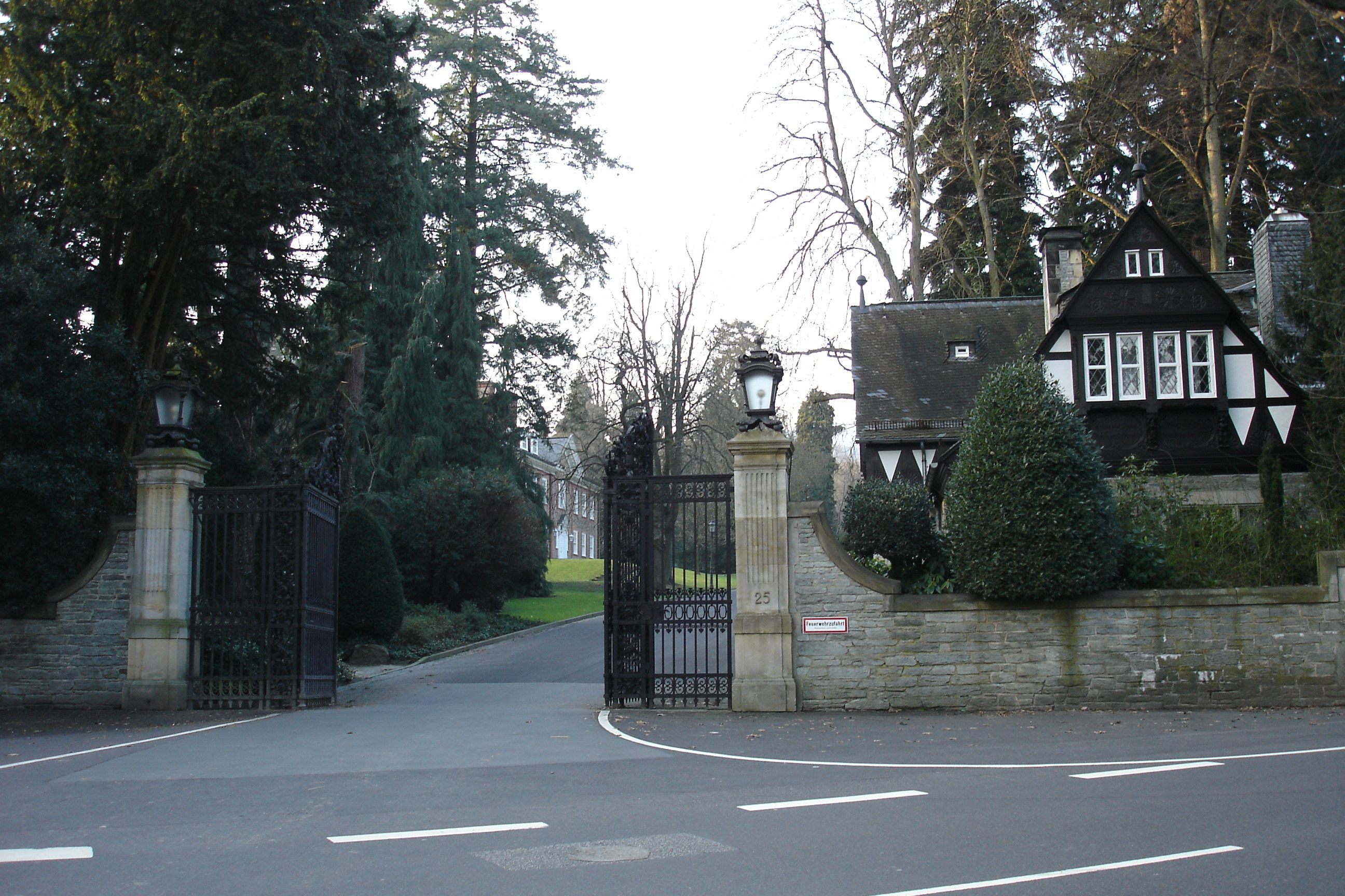 Einfahrt in Schlosspark und Zufahrt zum Schloss Friedrichshof